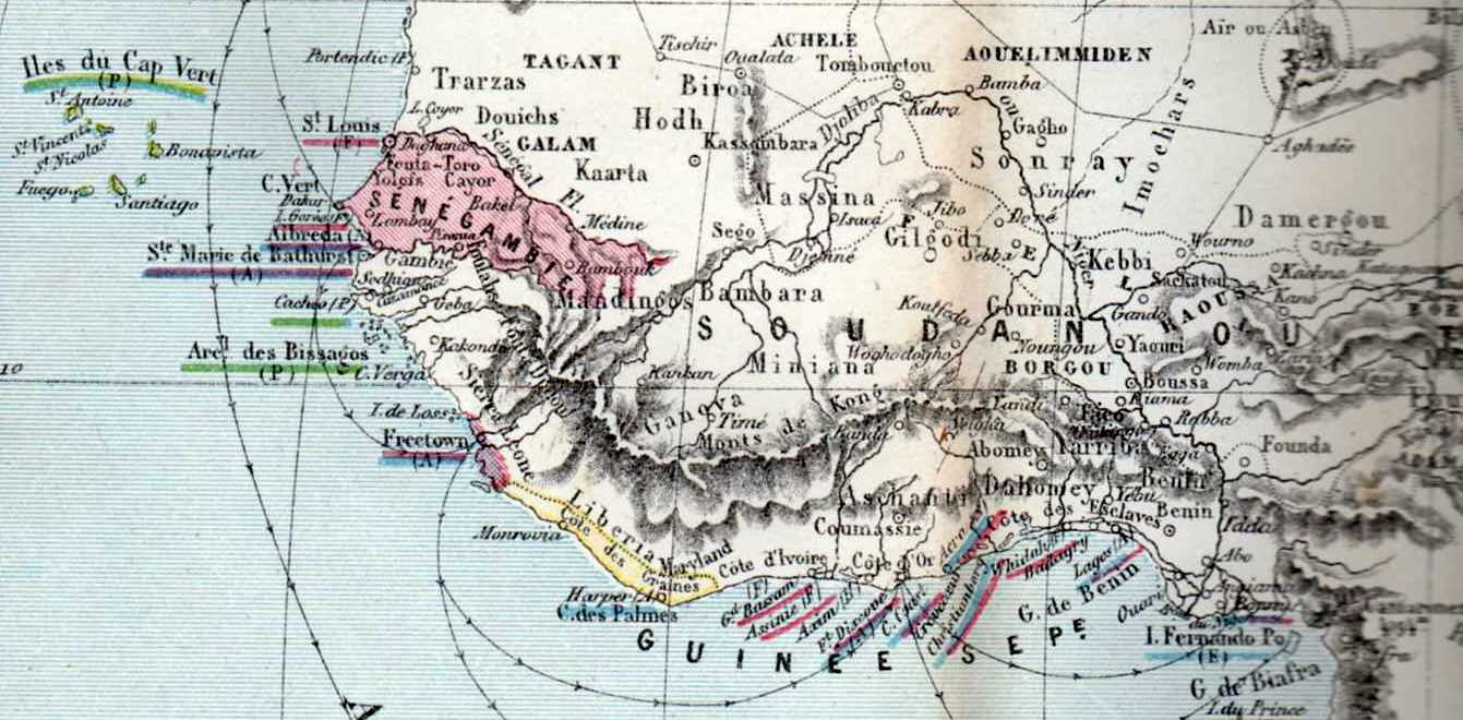 Détail d'une carte d'Afrique de 1880 env. (Atlas universel de géographie Drioux et Leroy, Paris, Eugène Belin, 1881) faisant apparaître les légendaires Monts de Kong